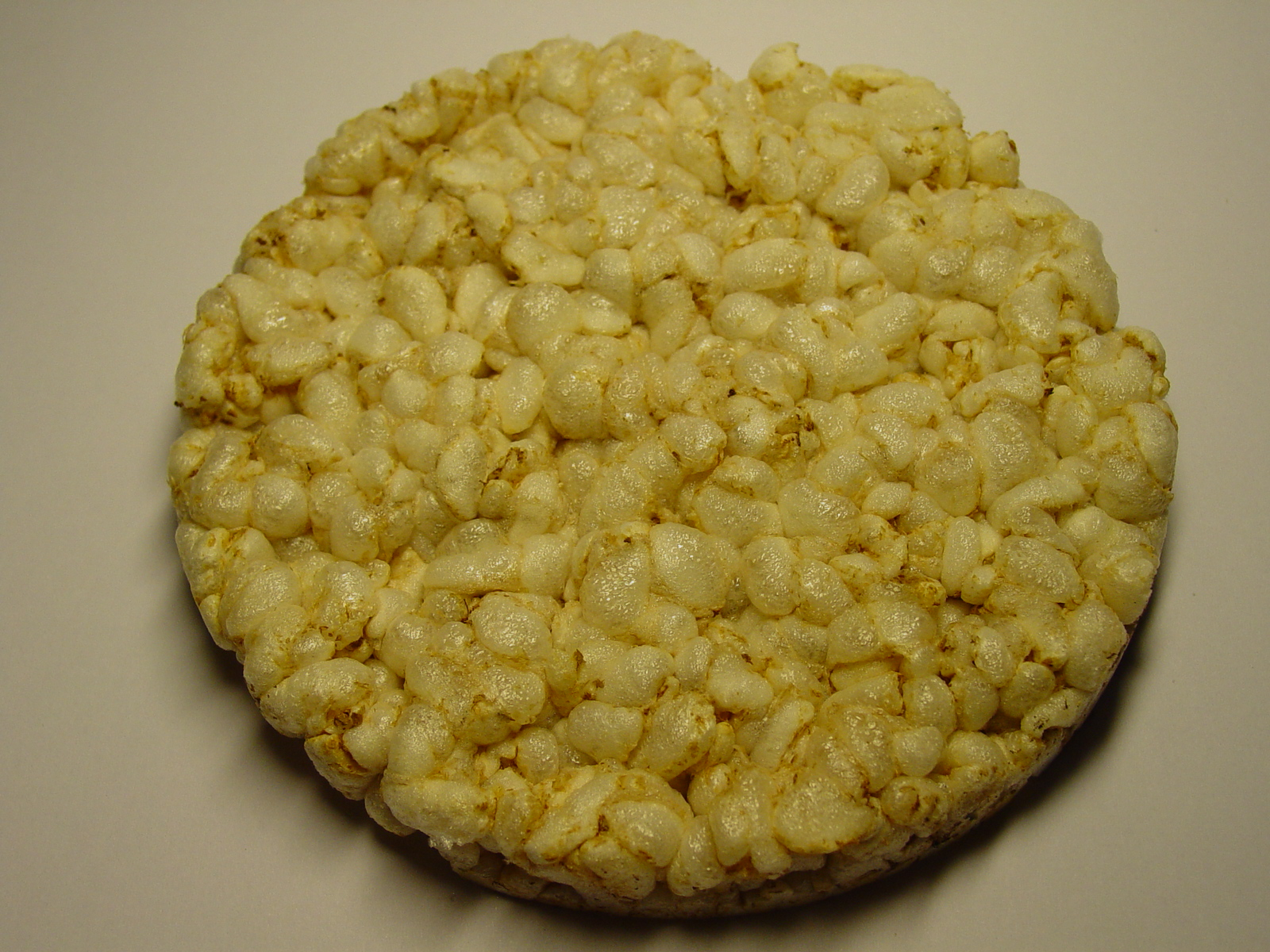 Rijstwafel